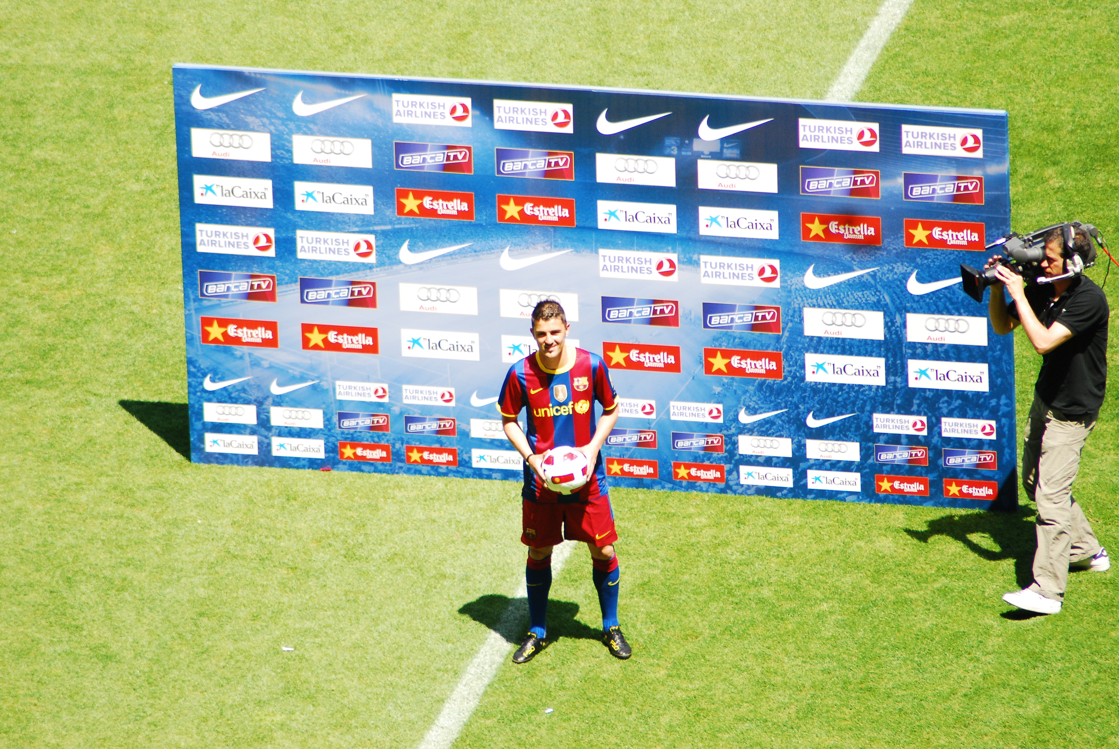 Presentación de David Villa como jugador del FC Barcelona.